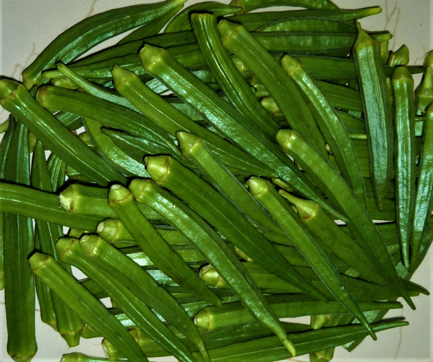 బెండకాయలు (పచ్చివి)